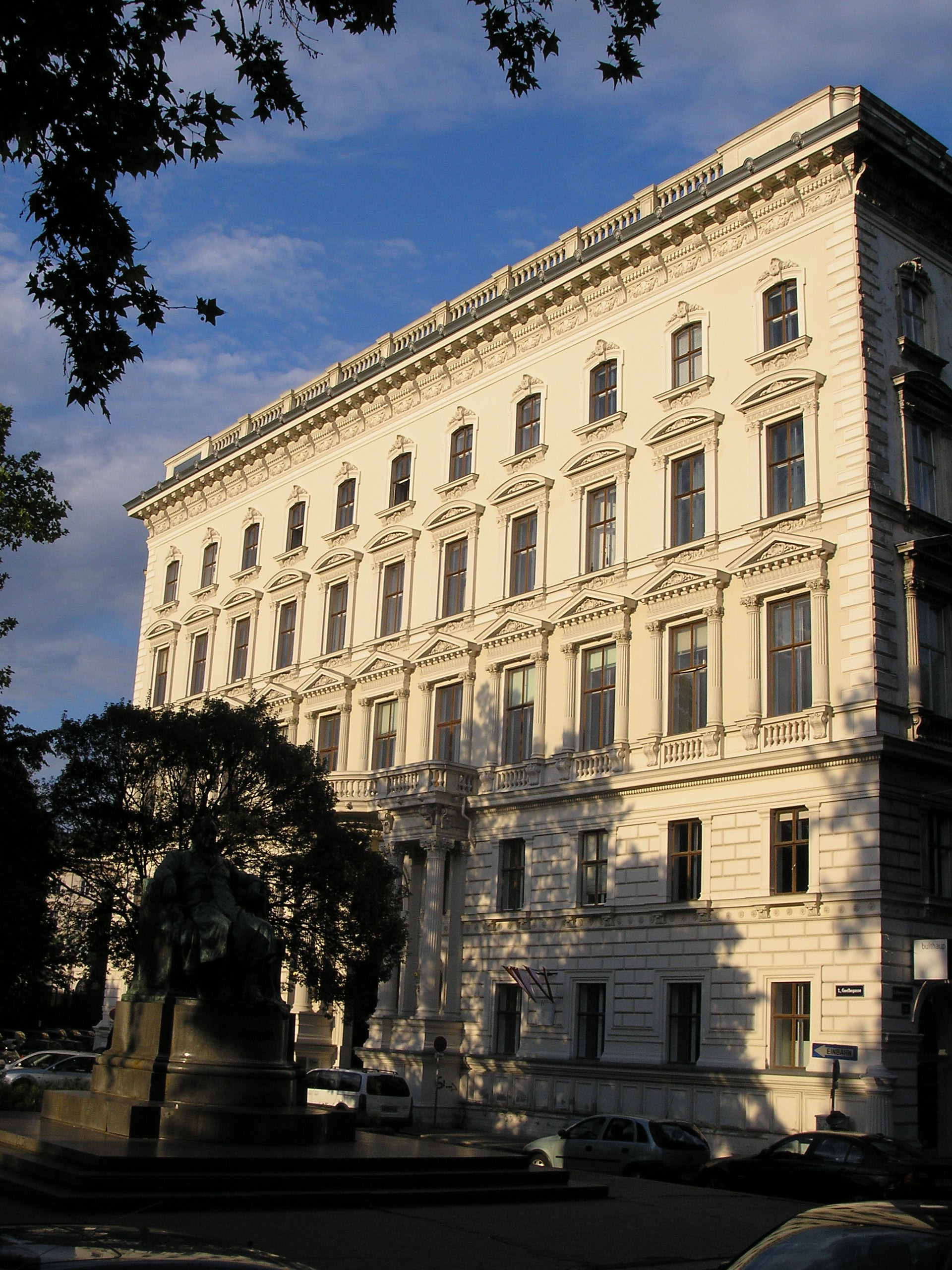 Palais Schey in Wien erbaut 1863/64 nach Plänen von August Schwendewein und für Friedrich Freiherr Schey von Koromla, Bankier und Förderer der Kunst.